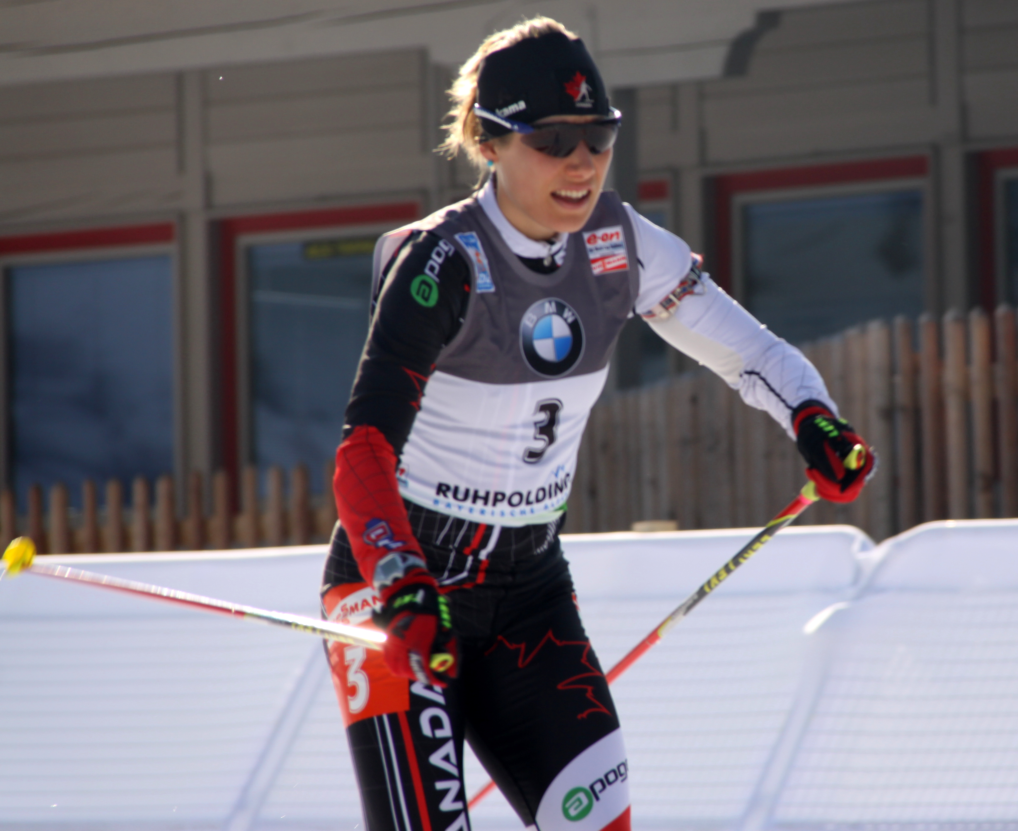 3 Zina Kocher CAN - WM 2012 Ruhpolding